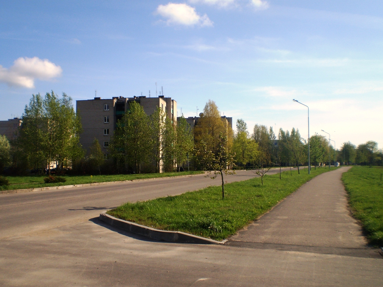 Vilainiai, Kėdainių raj.